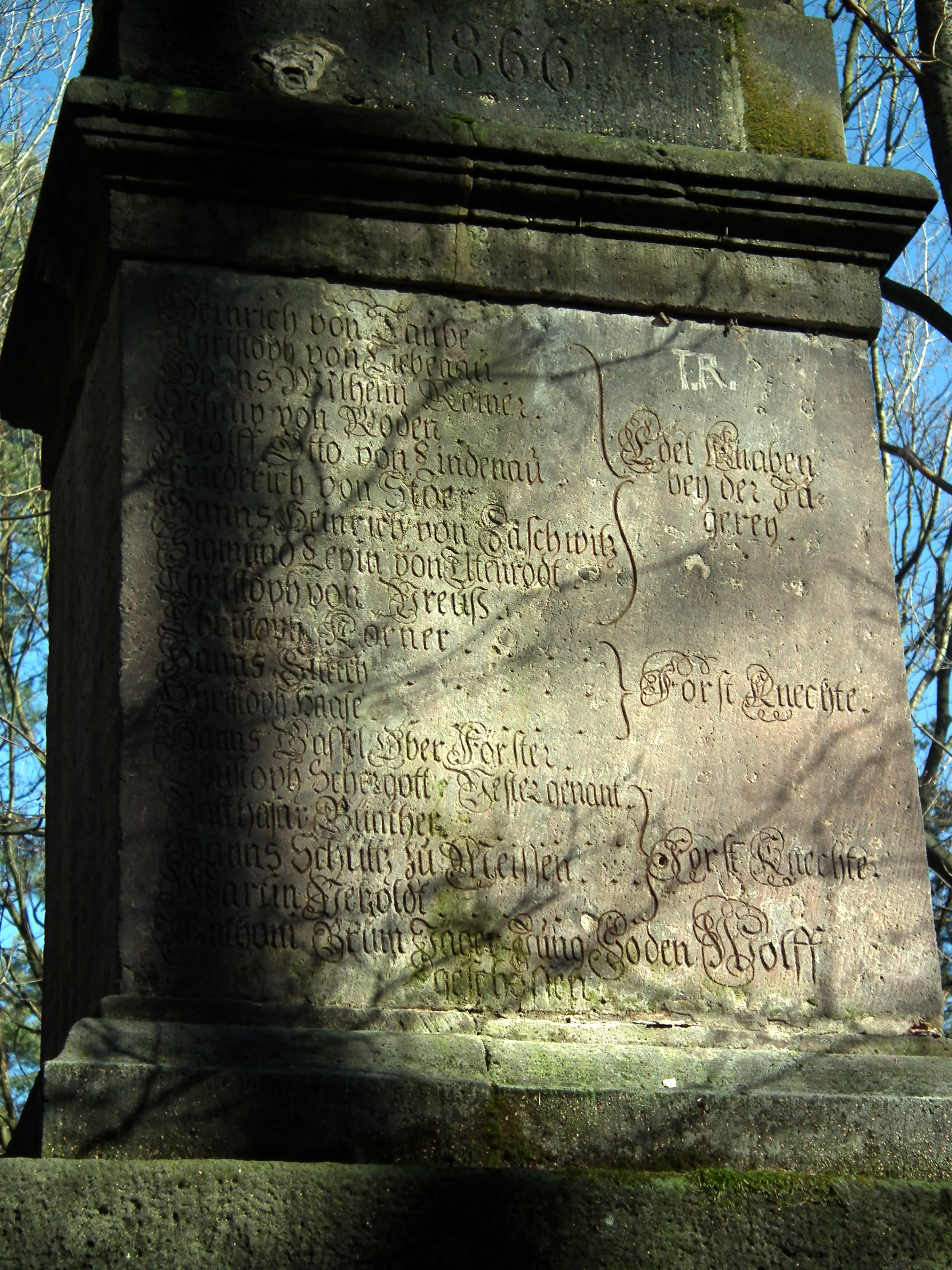 Wolfssäule Friedewald, Weinböhla, Sachsen, Deutschland